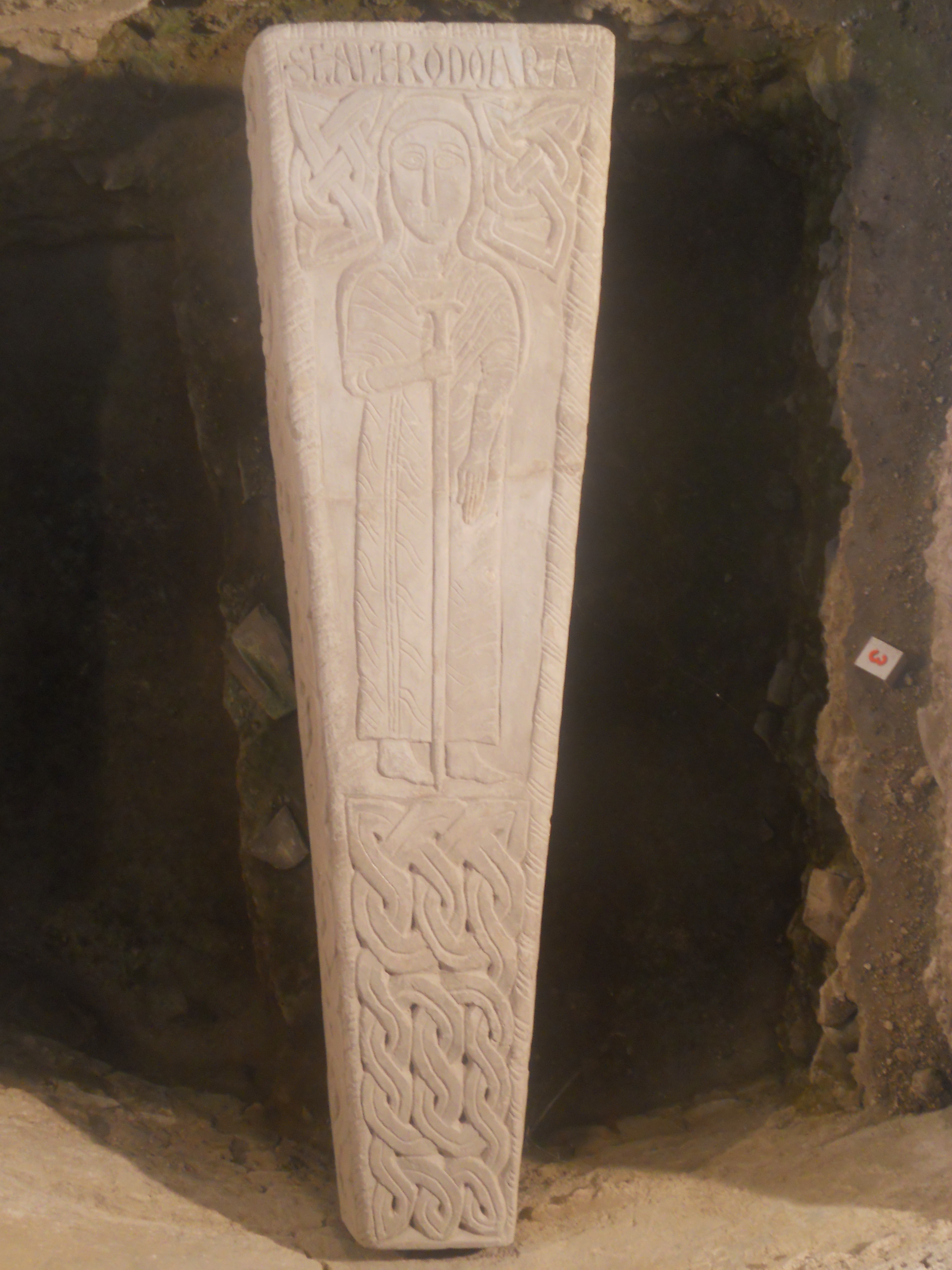 Sarcophage mérovingien du 7ème siècle , visible par des vitres dans le sol du choeur de la collégiale Saint-Ode d'Amay à l'endroit où il fut découvert le 22 janvier 1977 .